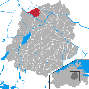 Nossendorf, Landkreis Demmin, Mecklenburg-Vorpommern